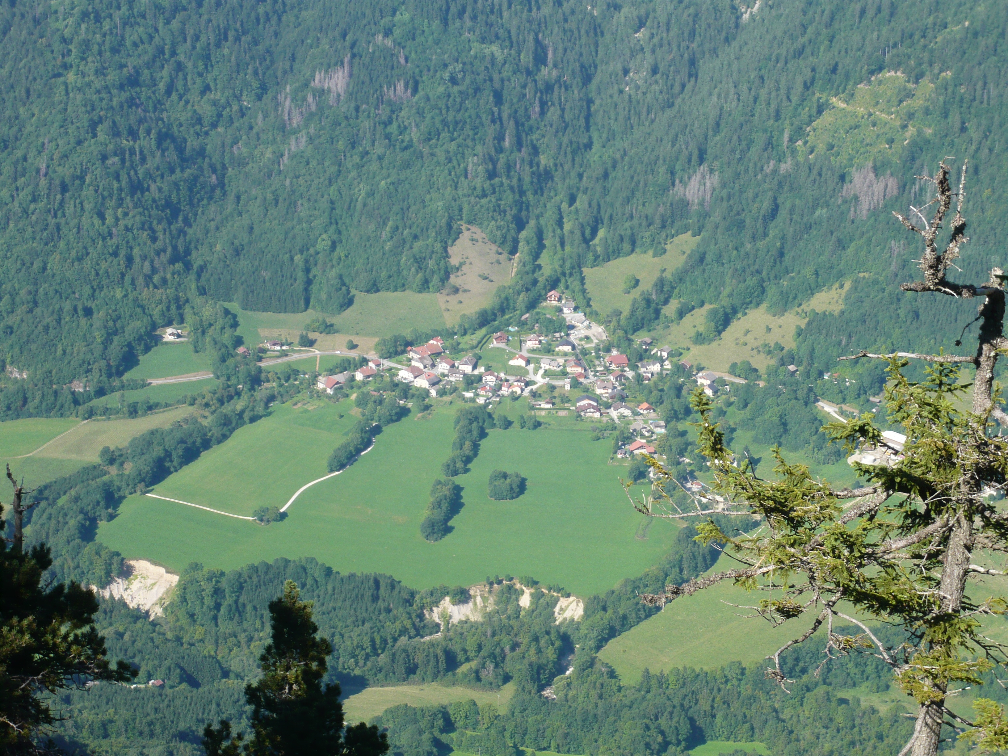 Usillon